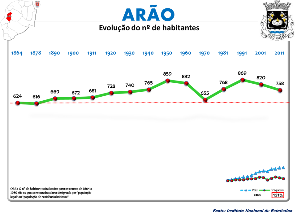 Censos 1864/2011